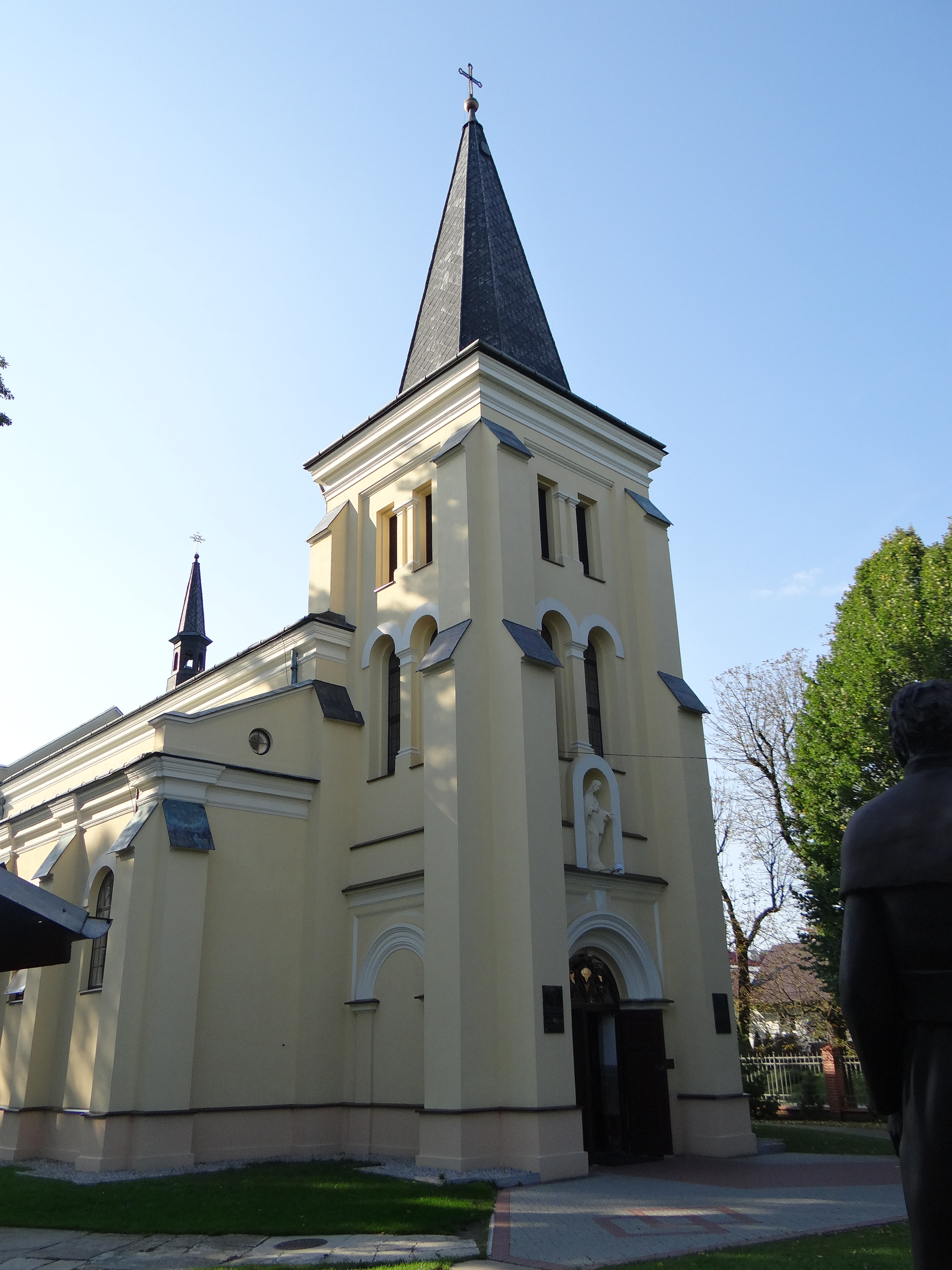 Gać, kościół par. p.w. Wniebowzięcia NMP, 1893-1894